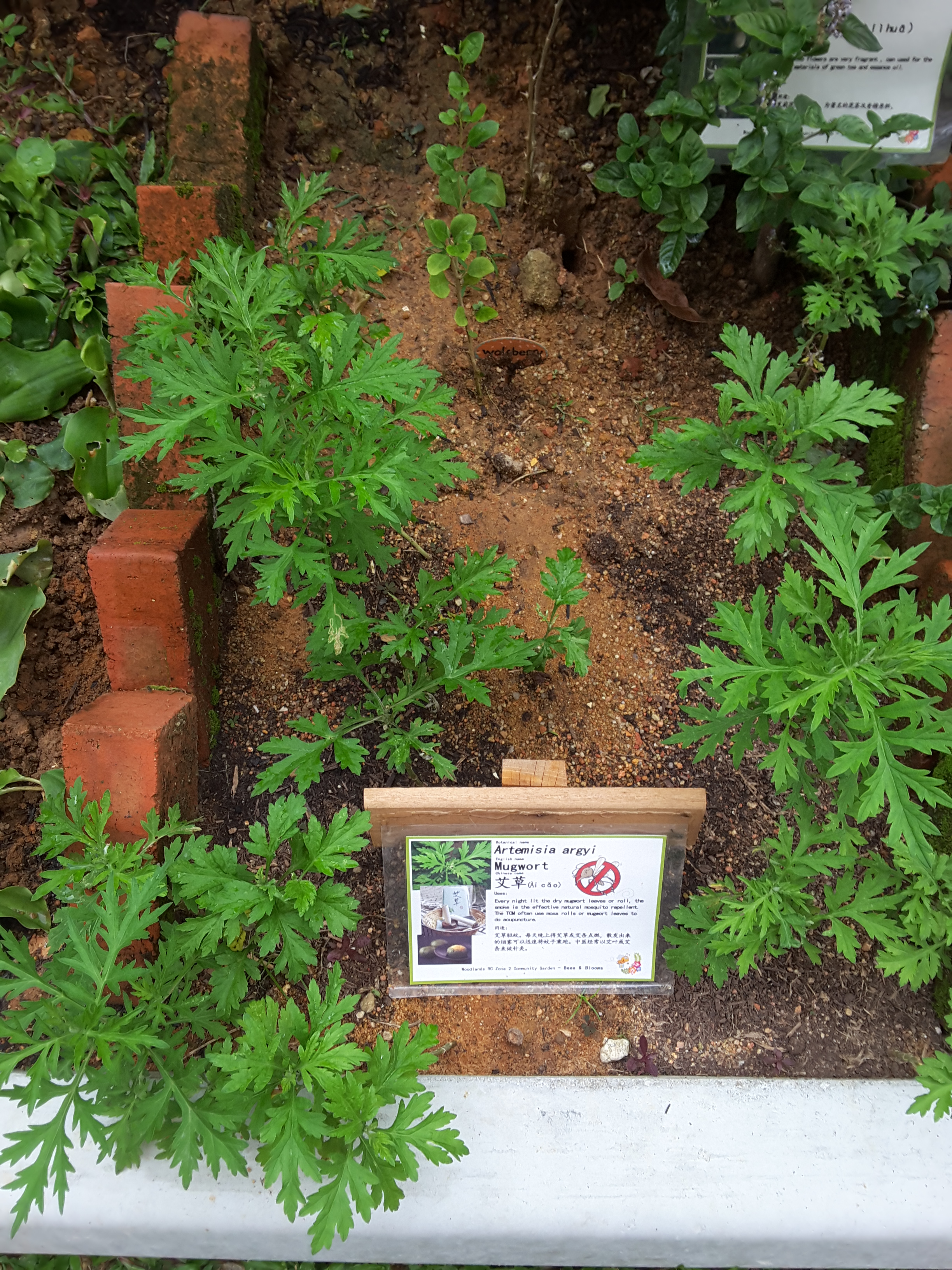 新加坡種植艾草